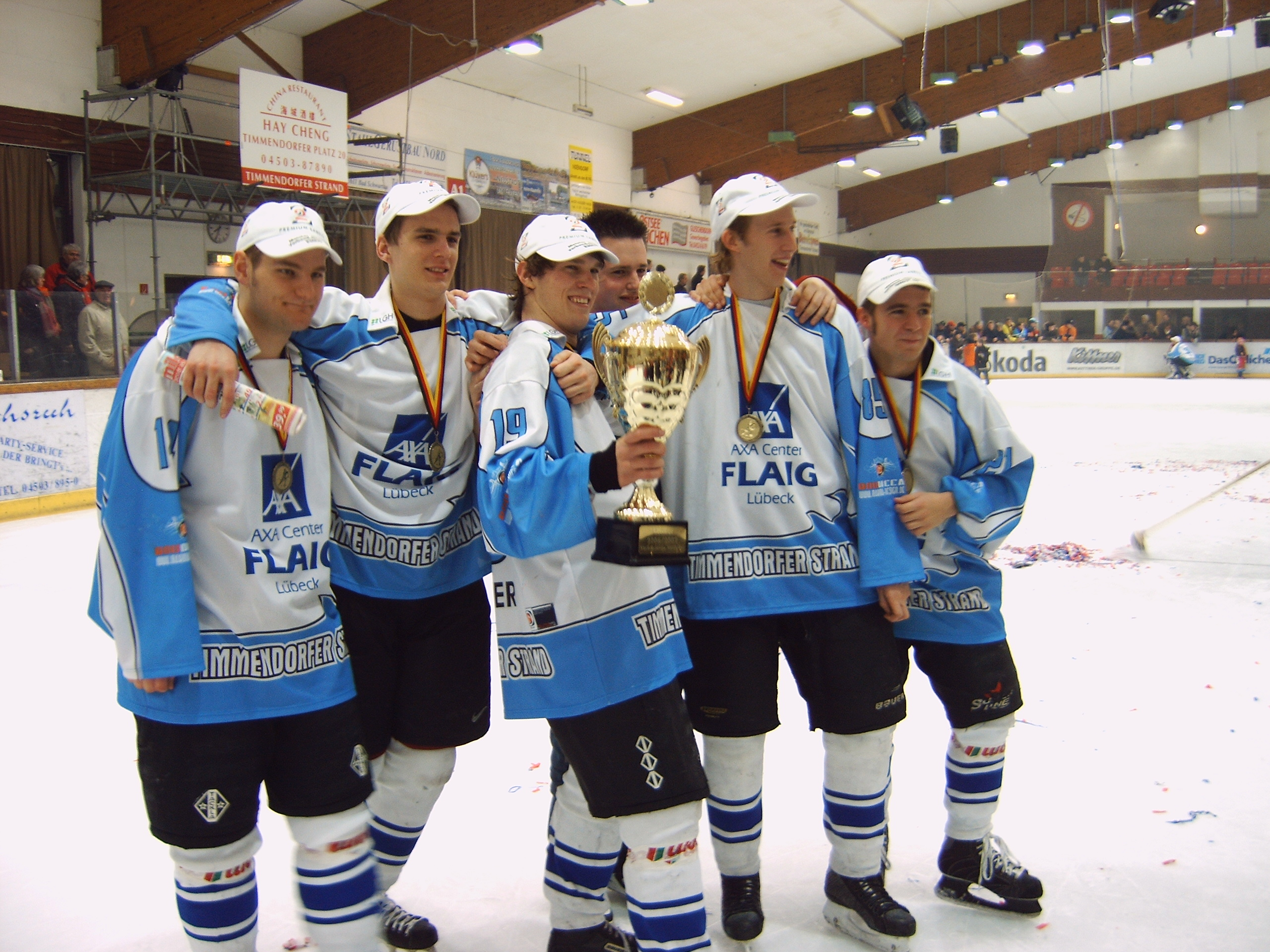 EHCT06, Eishockey, Timmendorfer Strand, Nachwuchs (v.l.n.r.:Julian Meyer, Alexander Giese, Eike Wagner, Dennis Hein, Lars Jessen (Fan), Thomas Wünsche)